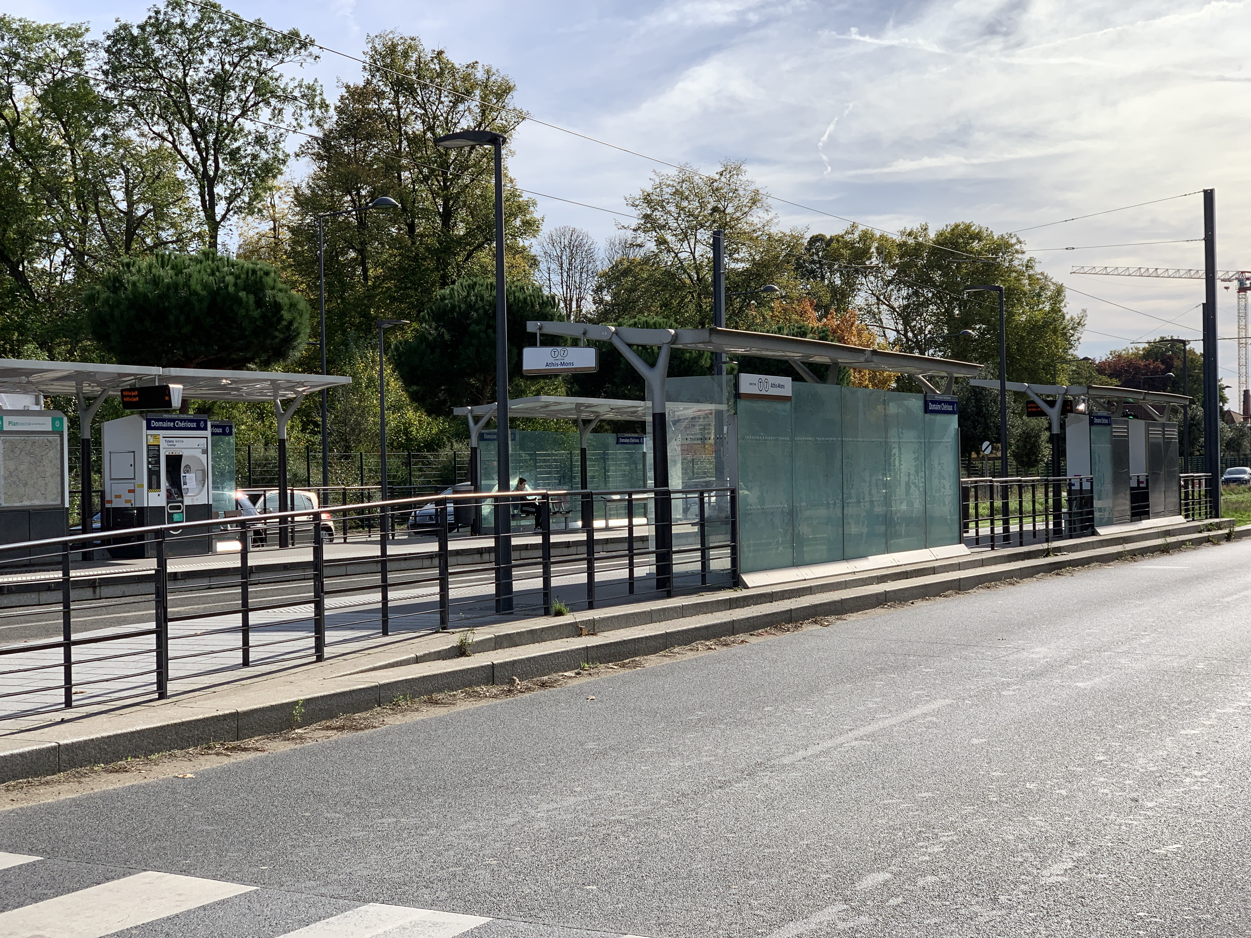 Station Domaine Chérioux de la ligne 7 du tramway d'Île-de-France, Chevilly-Larue.